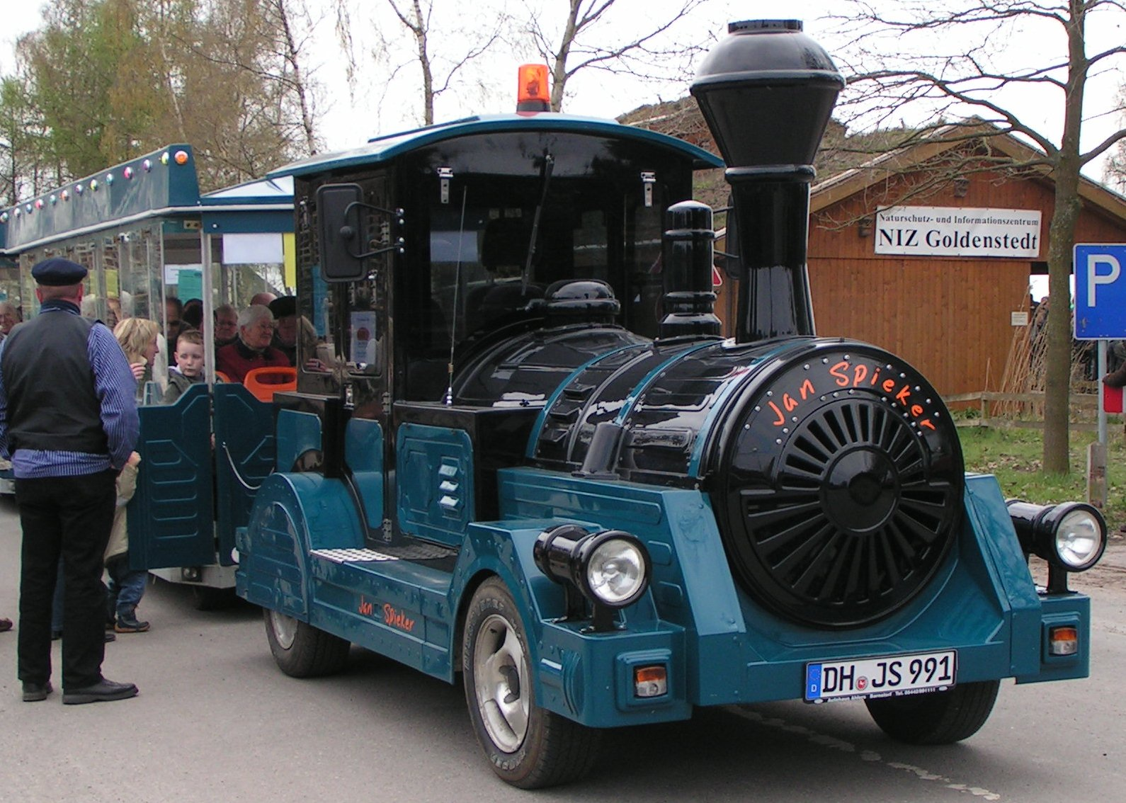 Moorbahn "Jan Spieker" am Startpunkt "Haus im Moor" (Goldenstedt)